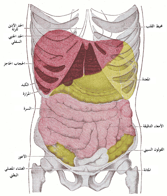 رسمٌ لِبعض الأعضاء الداخليَّة في جسم الإنسان.